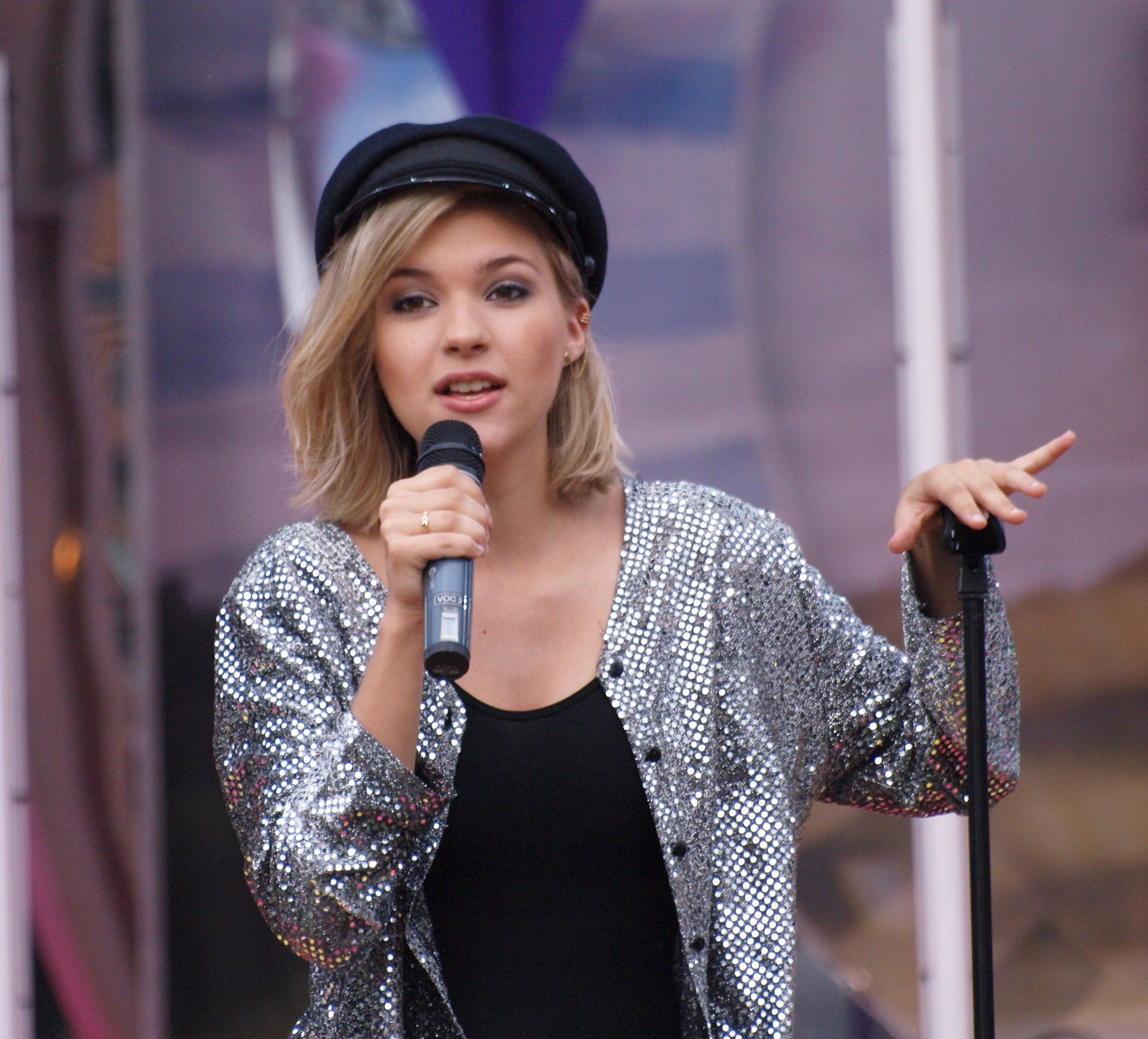 Tove Östman Styrke. Repetition inför Sommarkrysset.